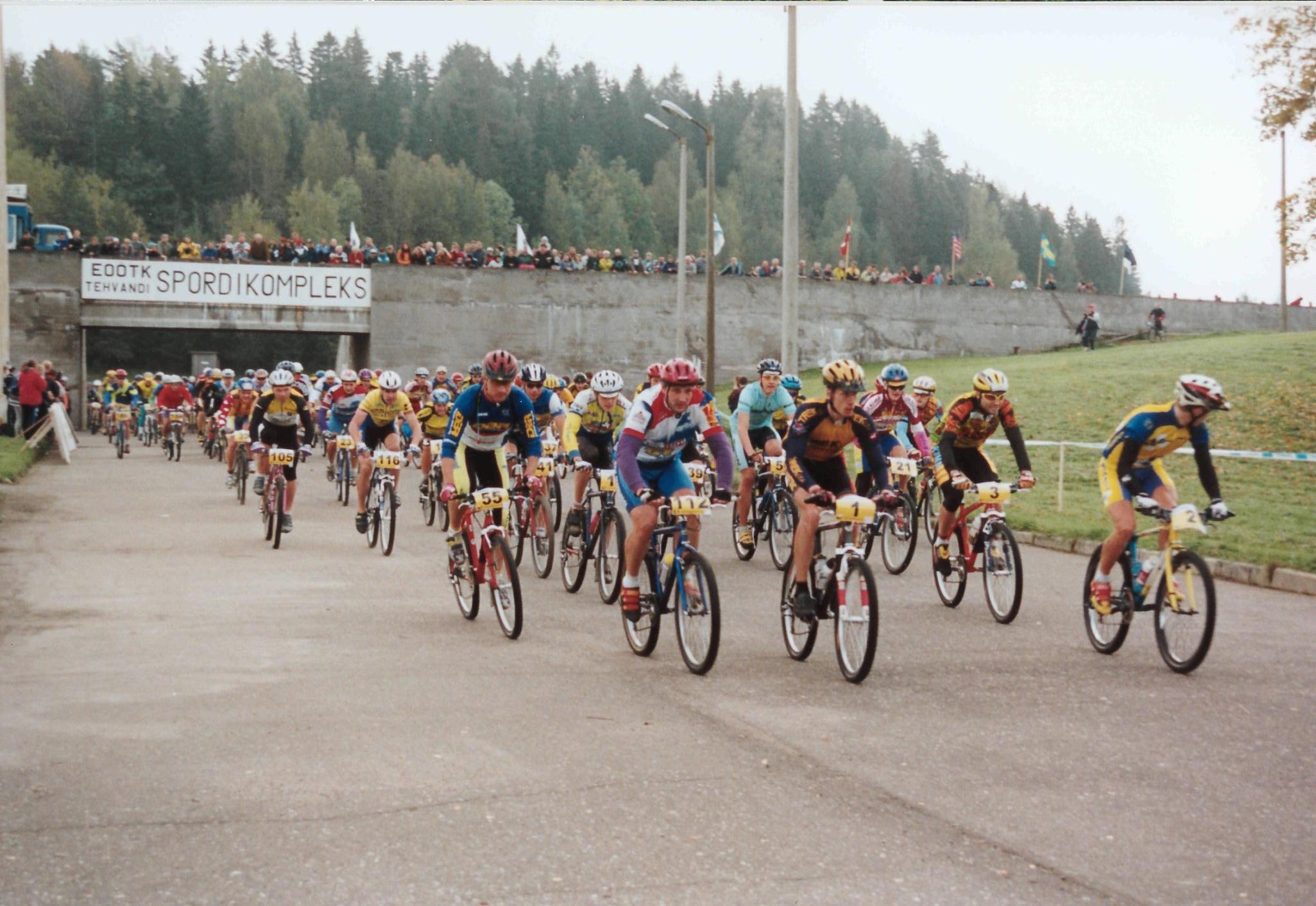 Tartu Rattamaraton aastal 1998